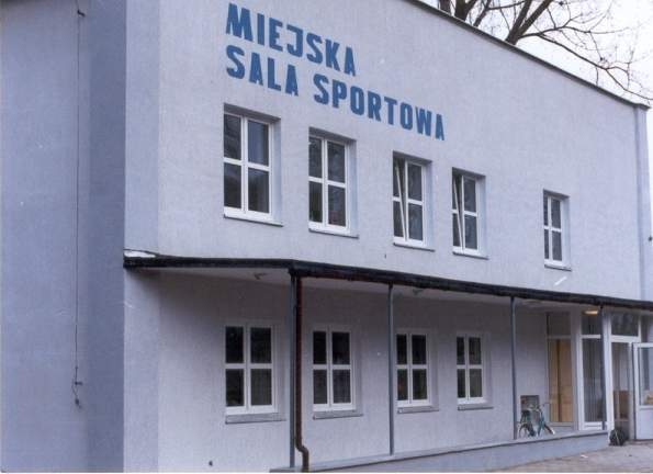 Miejka Sala Sportowa w Słubicach, ul. Akademicka